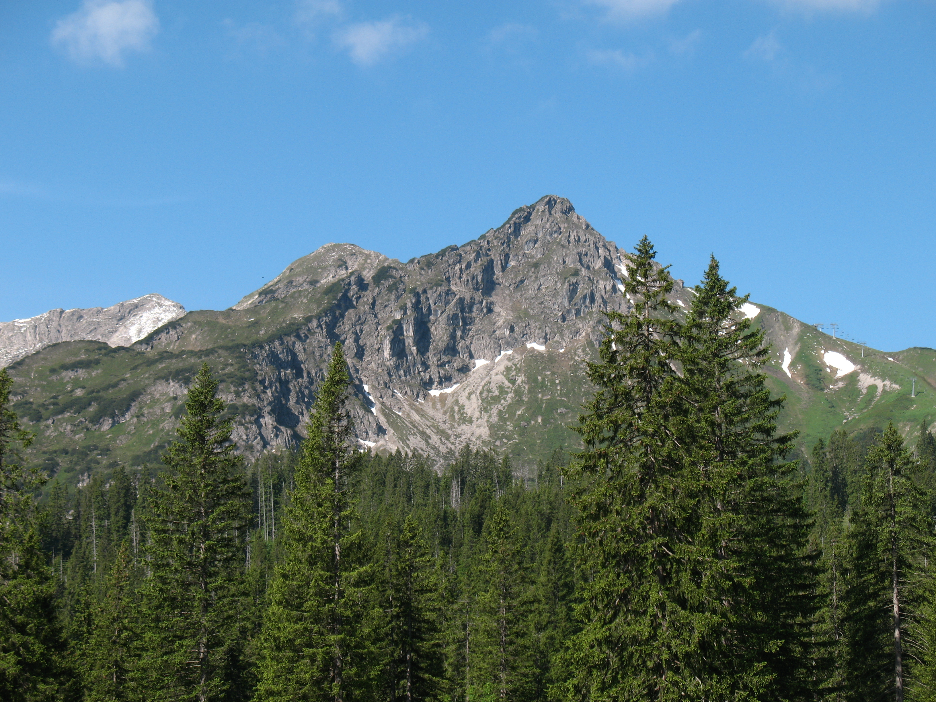 Blick aus Osten auf die Kanzelwand (im deutschen Sprachgebrauch: Warmatsgundkopf) (2058 m), dahinter ist die Walser Hammerspitze (früher in Österreich: Schüsser, 2170 m) zu sehen.